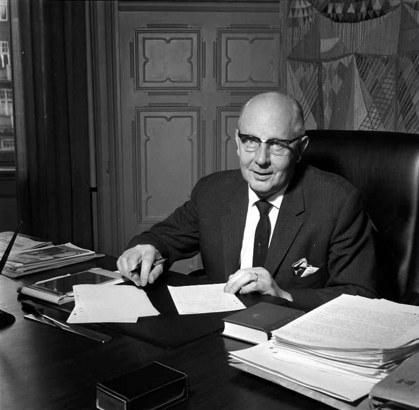 Börje Skartstedt 1961.